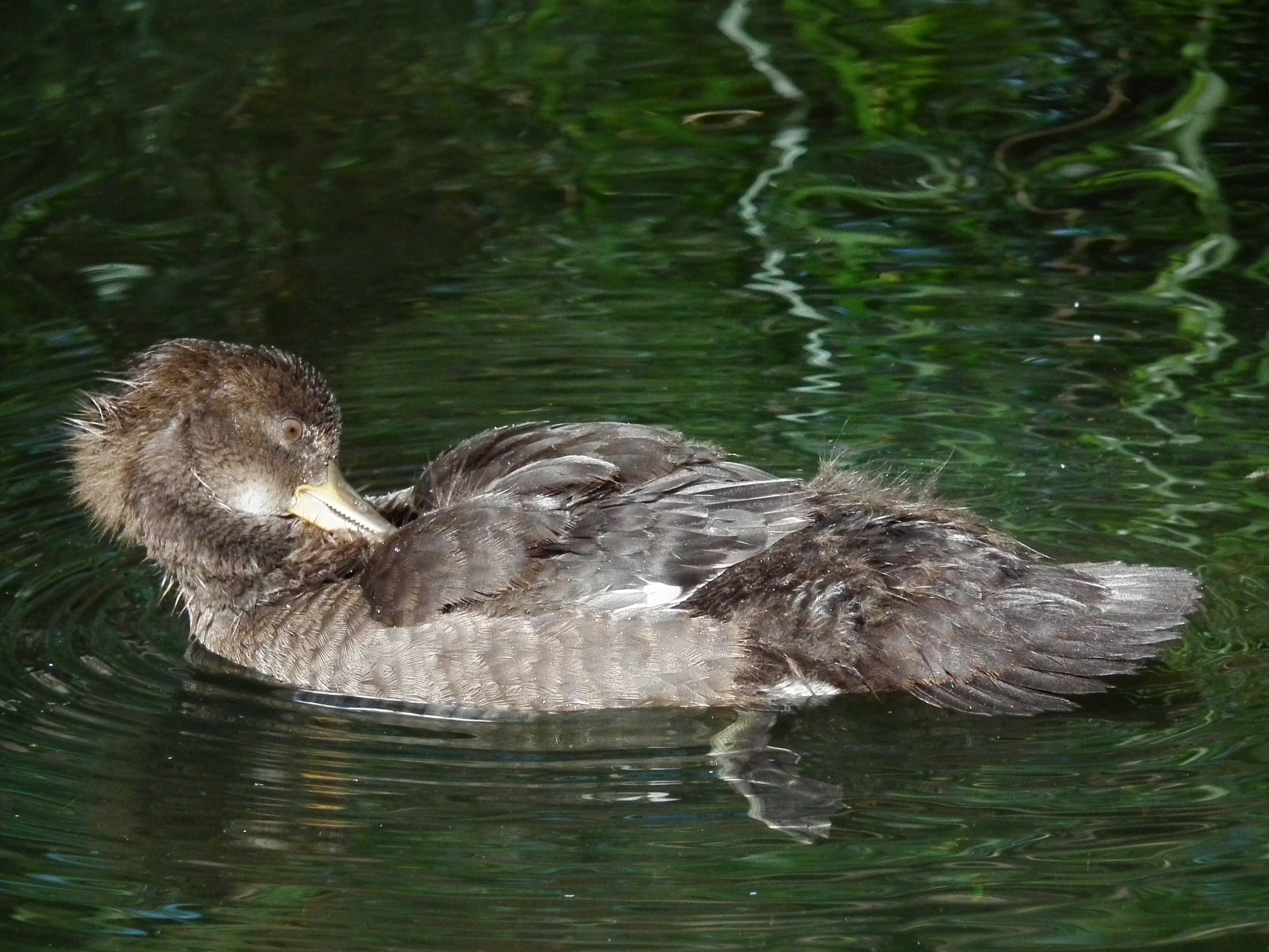 Küken des Kappensäger (Lophodytes cucullatus)